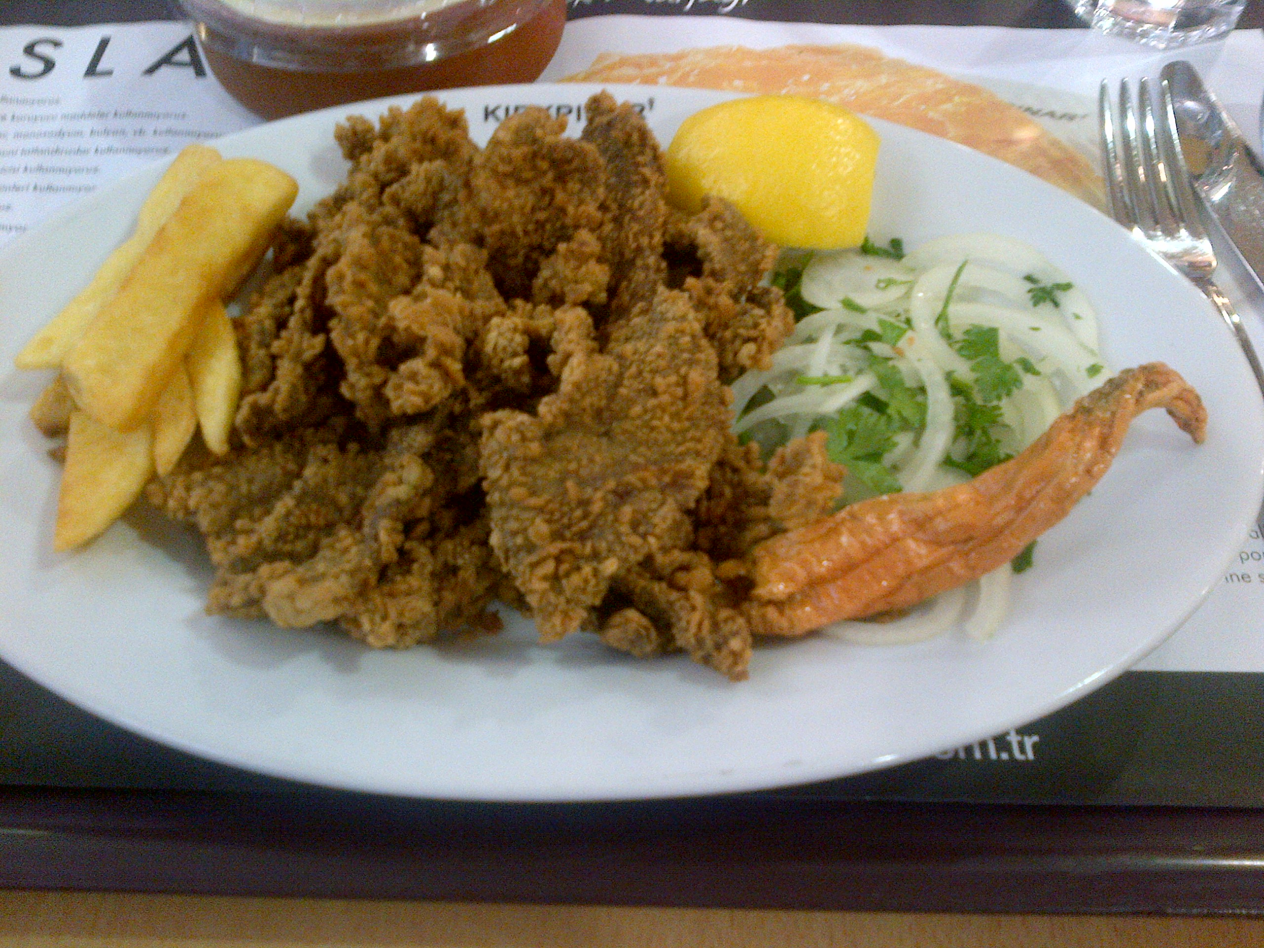 Ciğer tava de Edirne, Turquia.